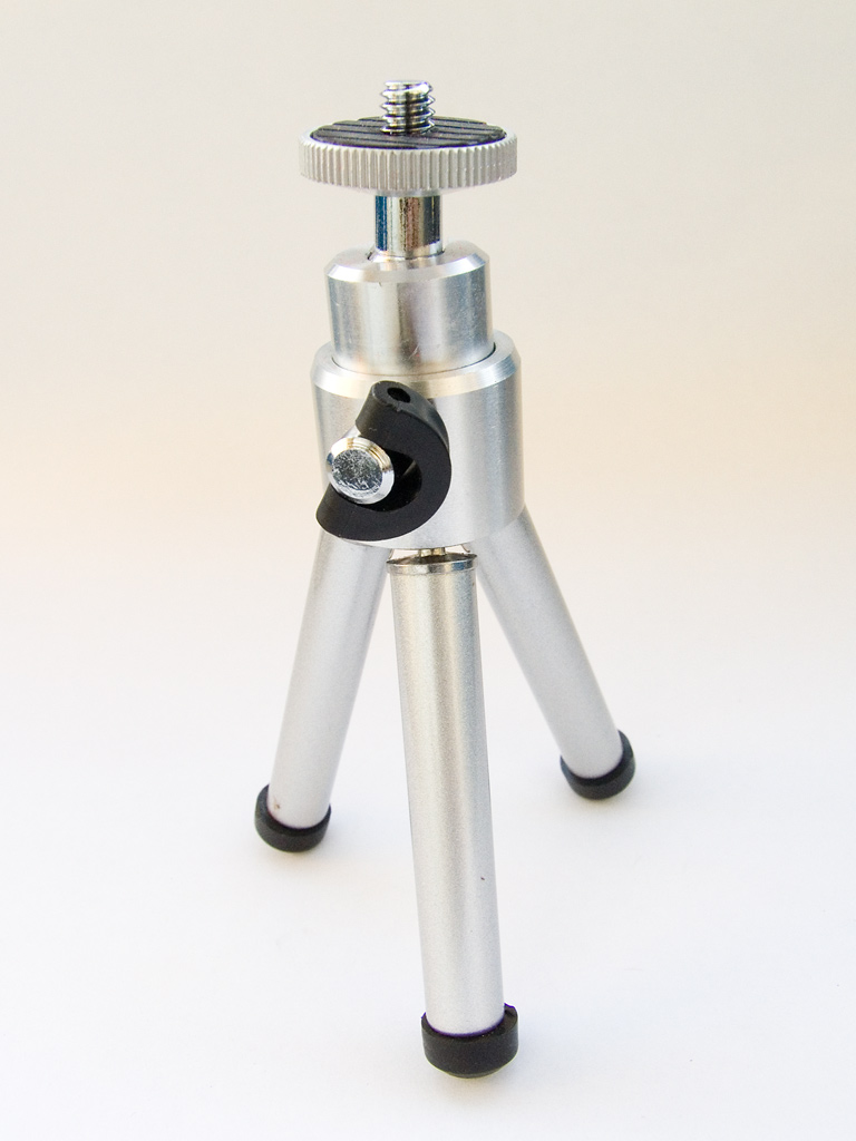 Tabletop tripod